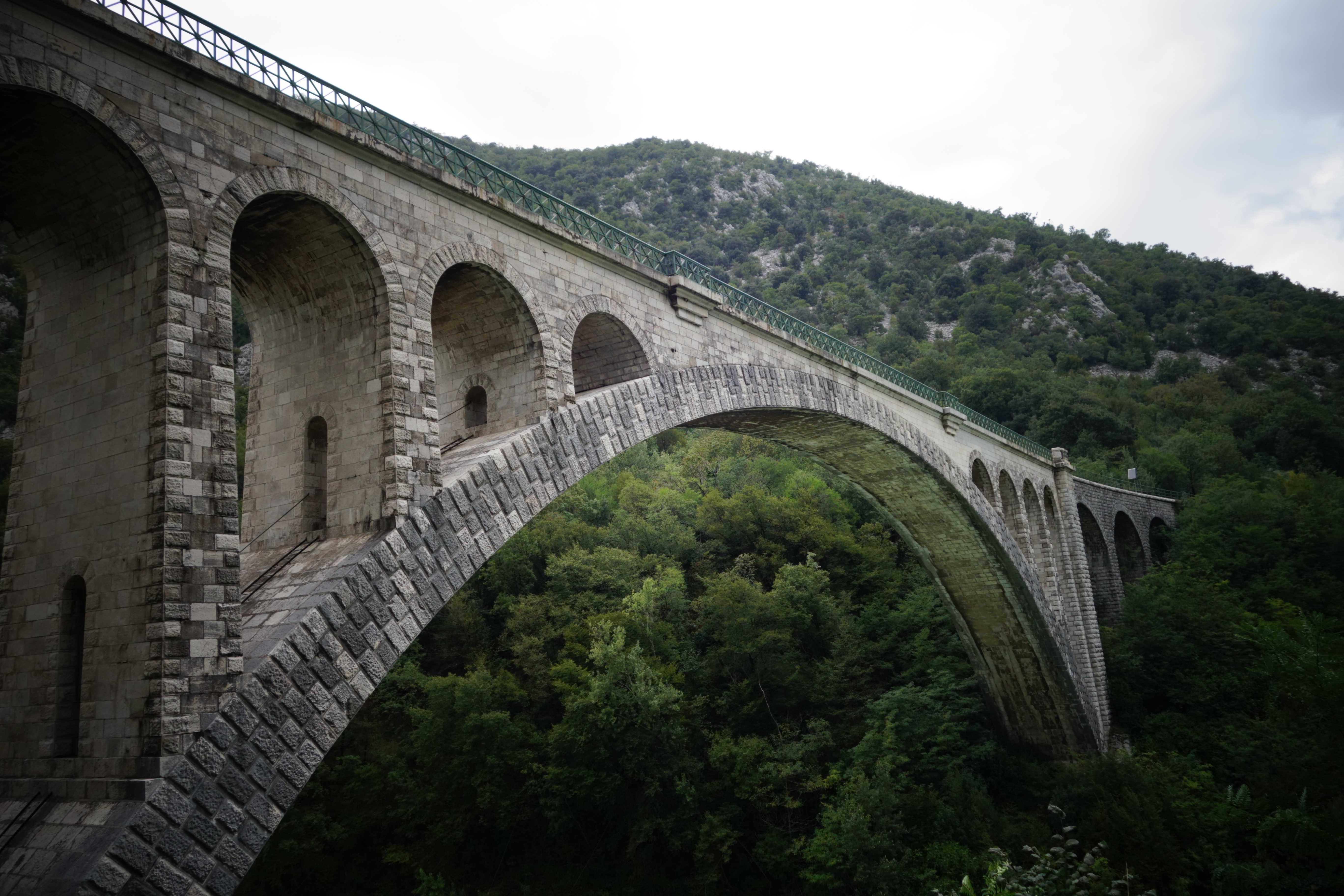 Solkan Bridge DSC07967